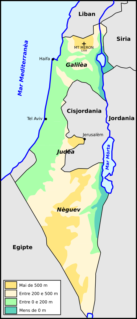 Topografia d'Israèl